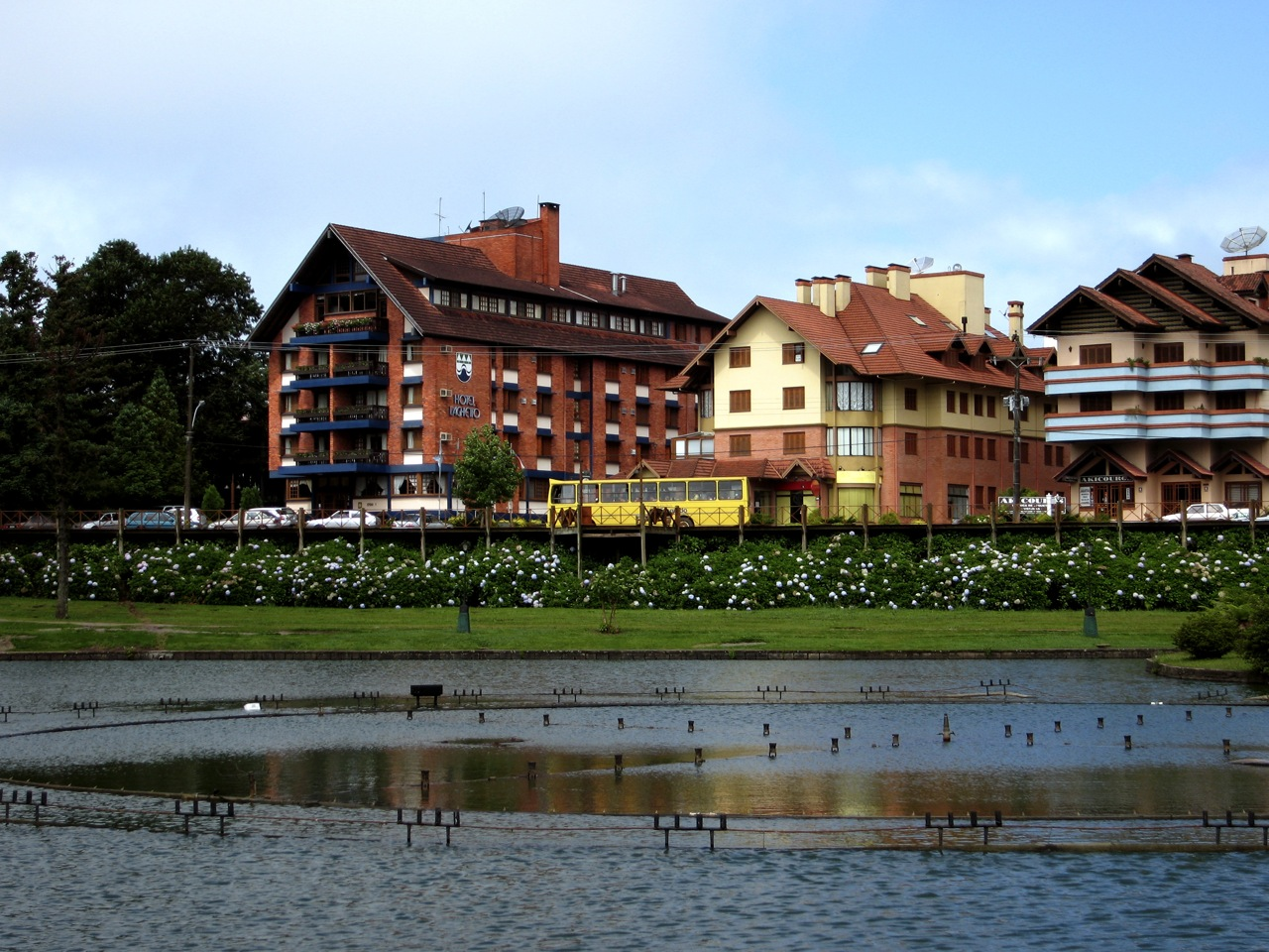 [ Gramado / RS, junto com a Luma]